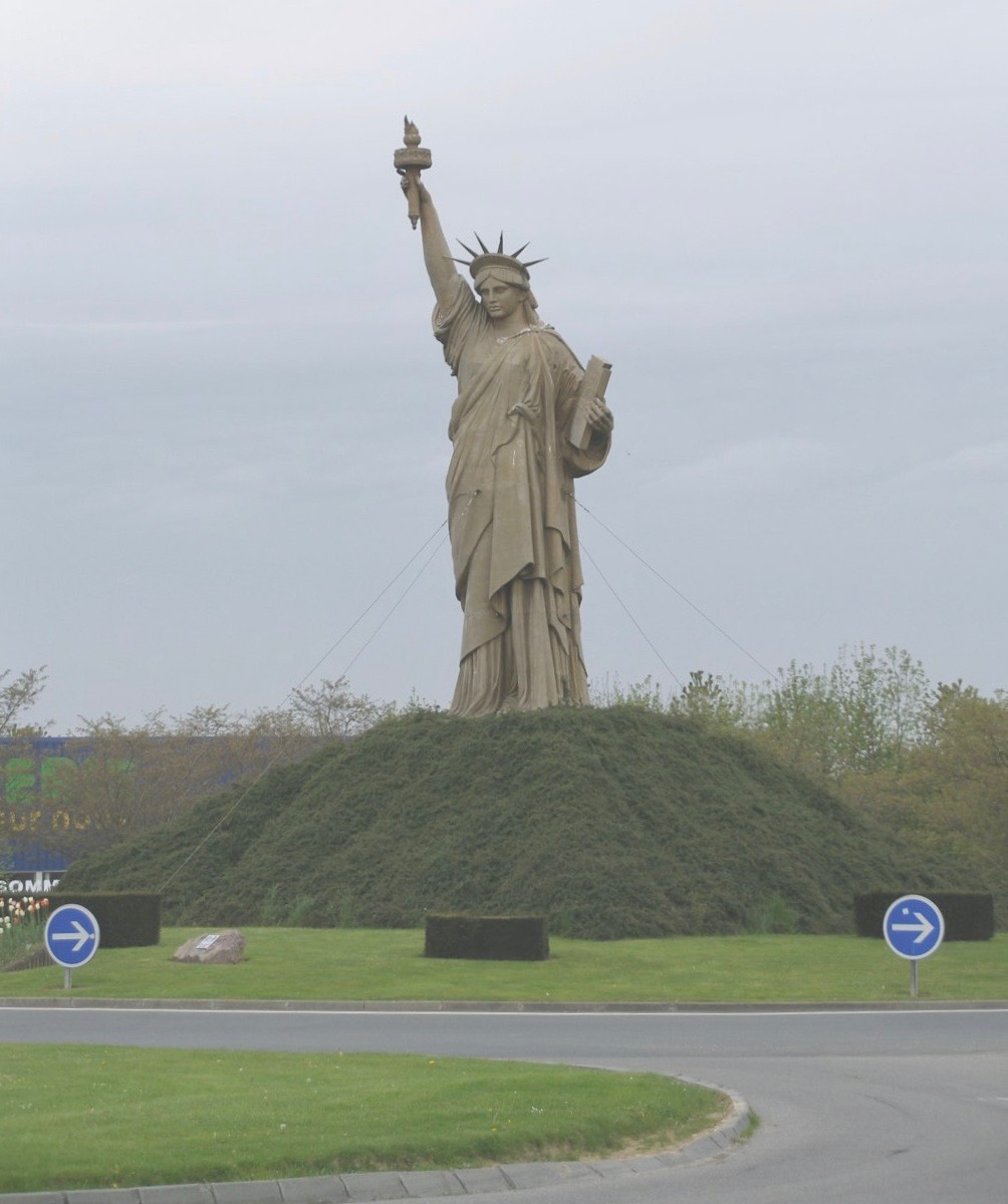 Statue de la Liberté à Barentin, près de Rouen (Seine-Maritime). Photo personnelle (mai 2006)